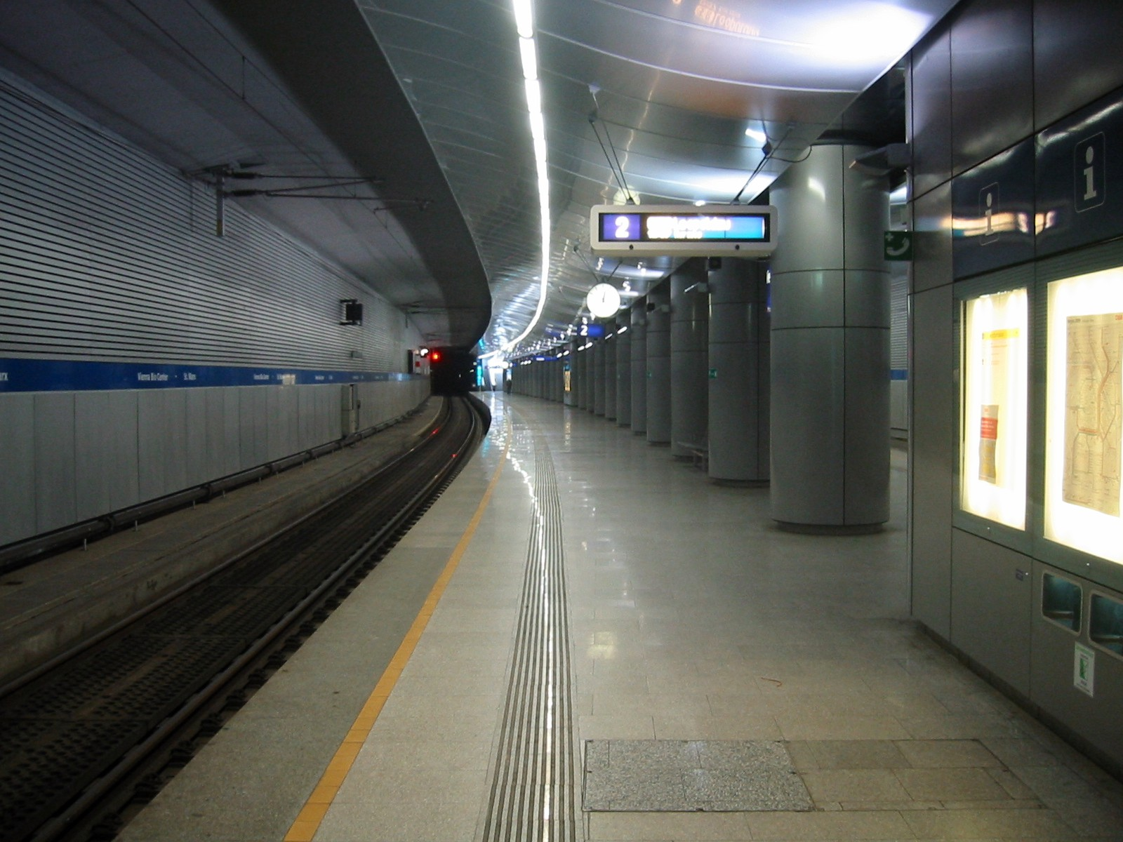 Wien, S-Bahn-Station St. Marx